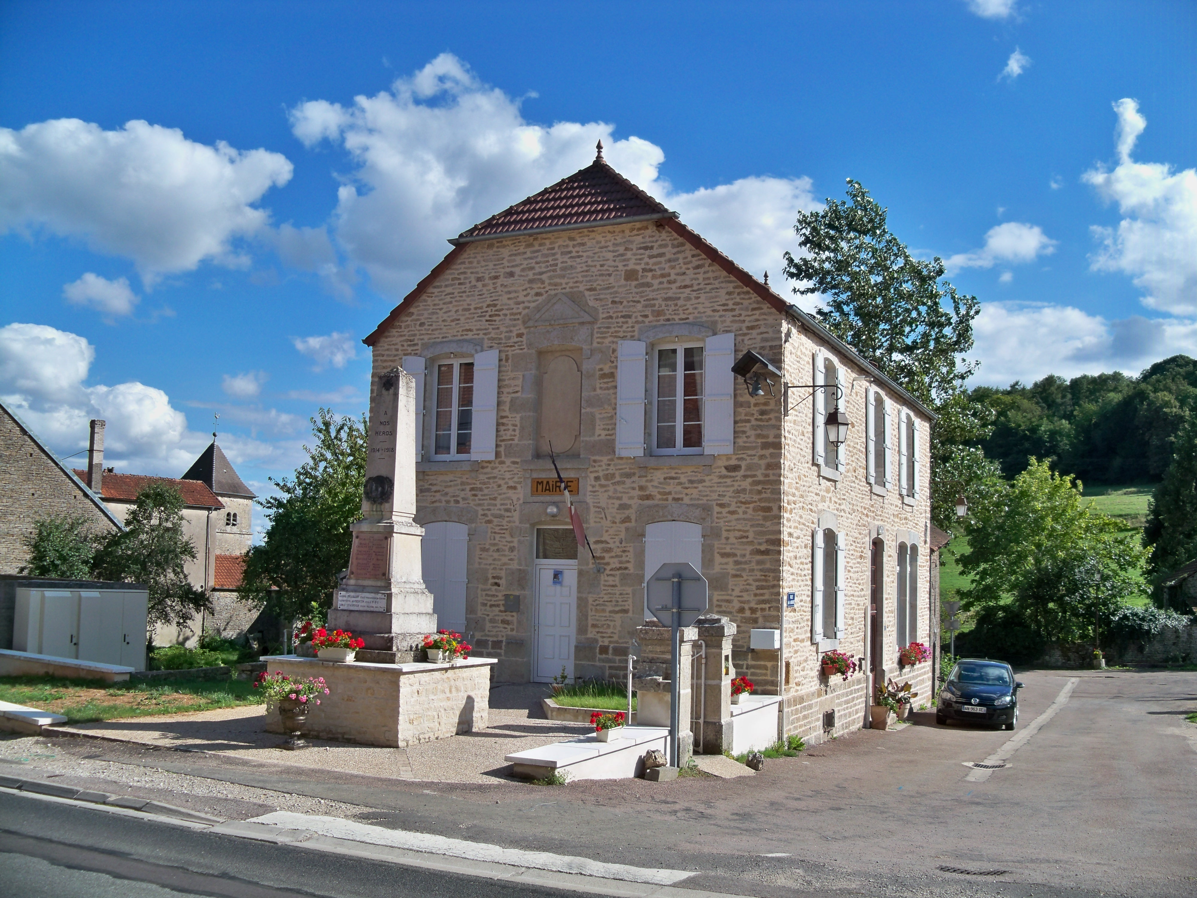 Mairie et Monument aux morts de Flageay, Haute-Marne, France